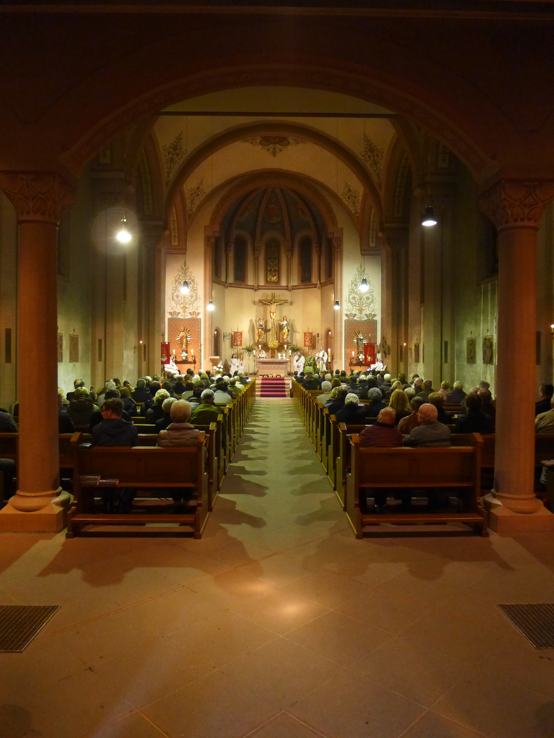 Wertheim, Kath. Pfarrkirche St.Venantius, Kircheninneres (letzte Messe vor der Schließung der Kirche anlässlich der Kirchenrenovierung, 15. November 2014)